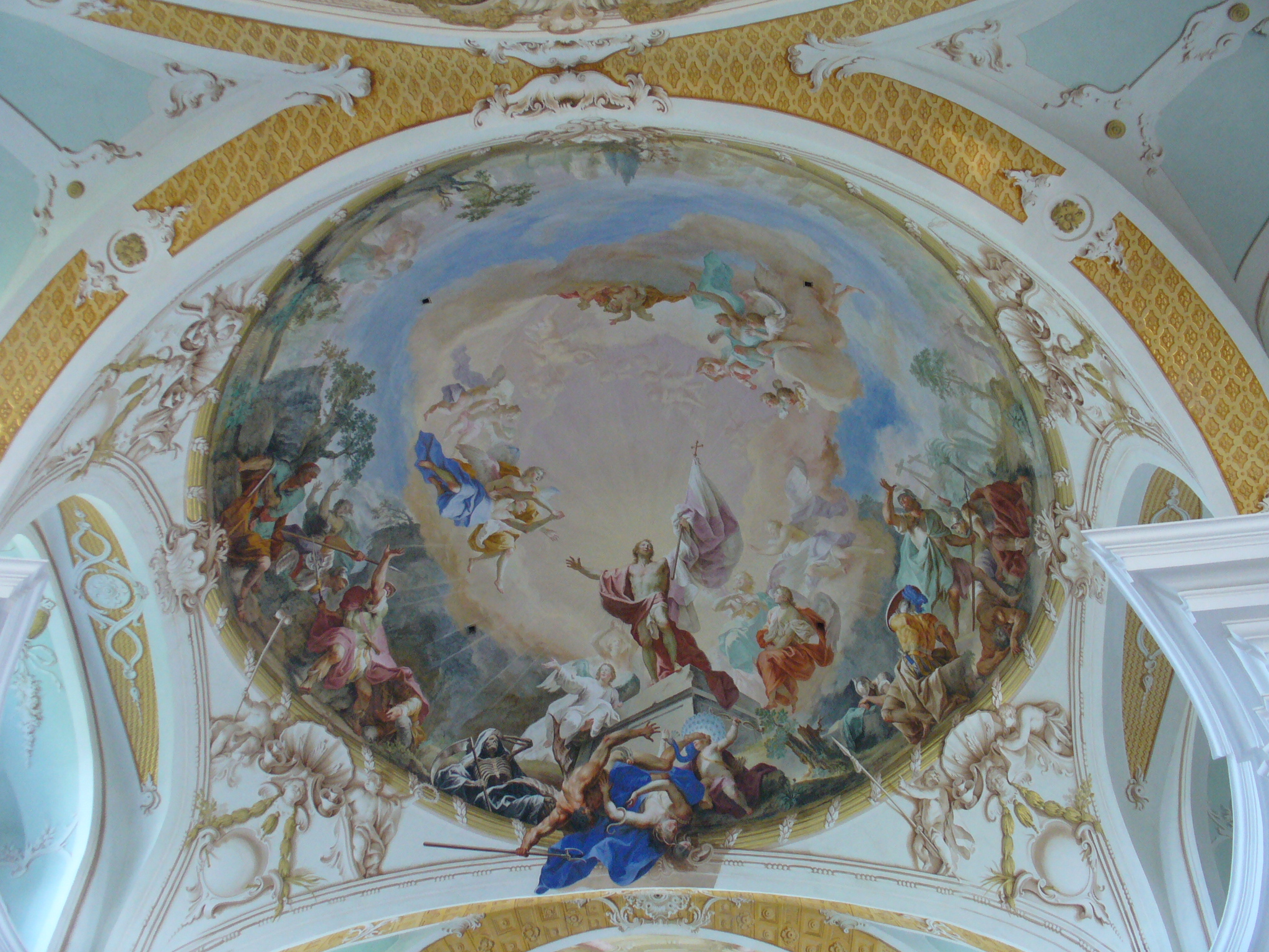 Neresheim, Klosterkirche, Fresko